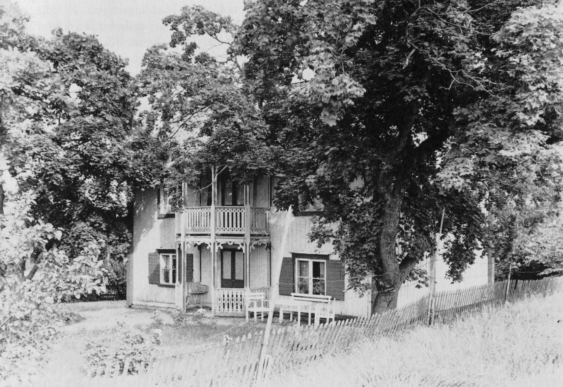 Ersta gårds huvudbyggnad i början på 1960-talet